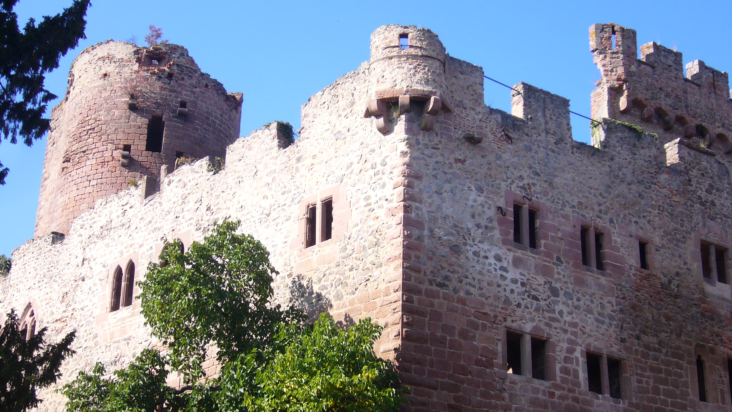 Ruine du château de Kintzheim